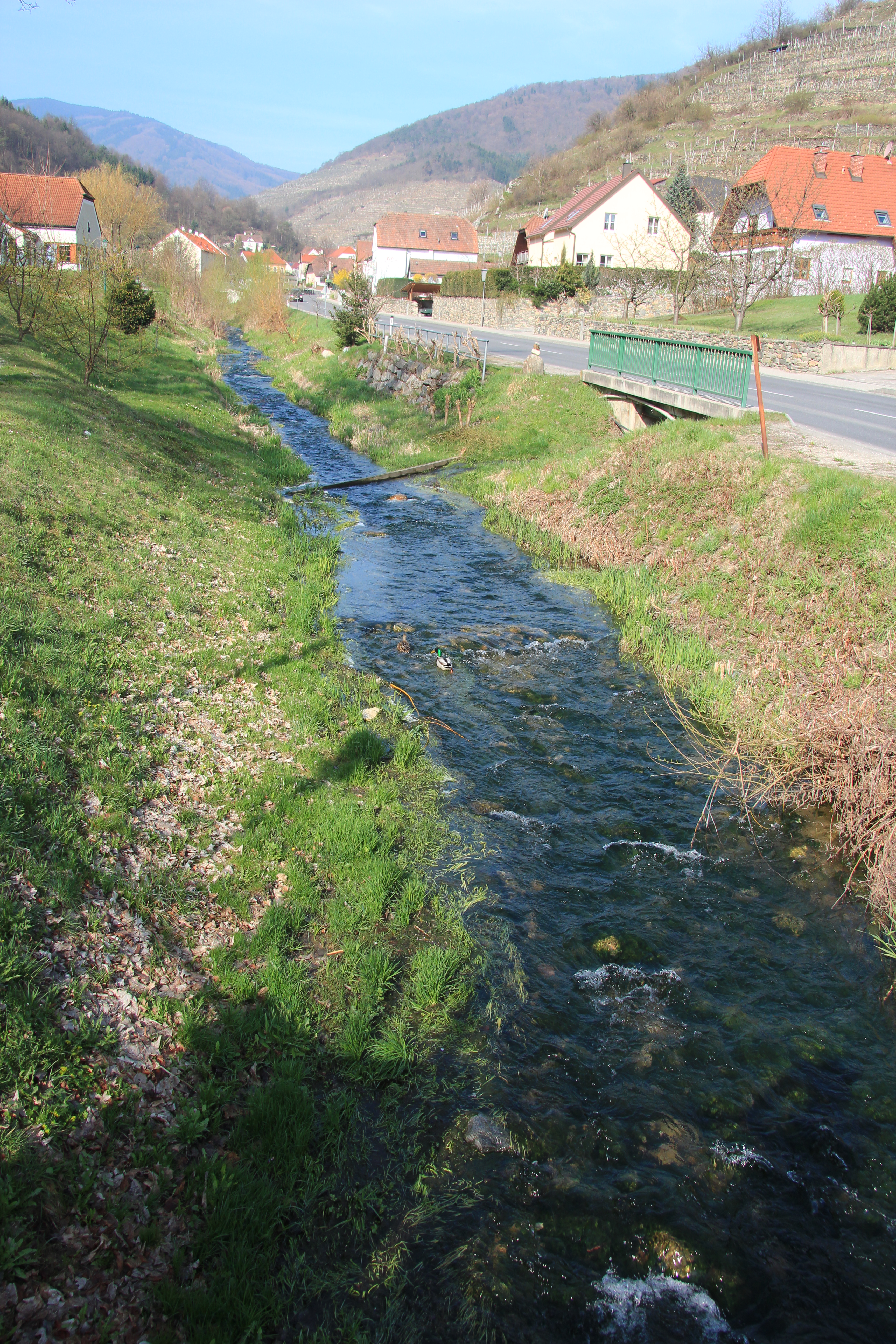 Spitz, Niederösterreich: Spitzer Bach, auf Höhe des Erlahofes / Schiffahrtsmuseums mit Blick bachaufwärts